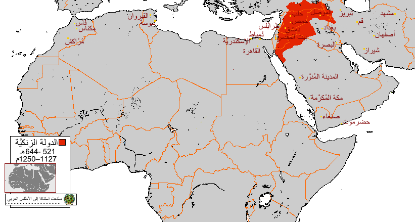 خارطة تُظهر حُدود الدولة الزنكيَّة. يُلاحظ أنَّ أنطاكية وقيليقية لم تدخلا ضمن نطاق الدولة الزنكيَّة بفضل جُهود الإمبراطوريَّة البيزنطيَّة في دفع المُسلمين عنها.